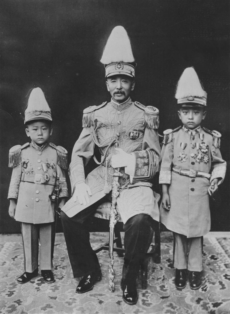 張作霖と五男学森、六男学俊。